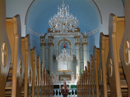 Slovenský Evanjelický kostol v Líziky